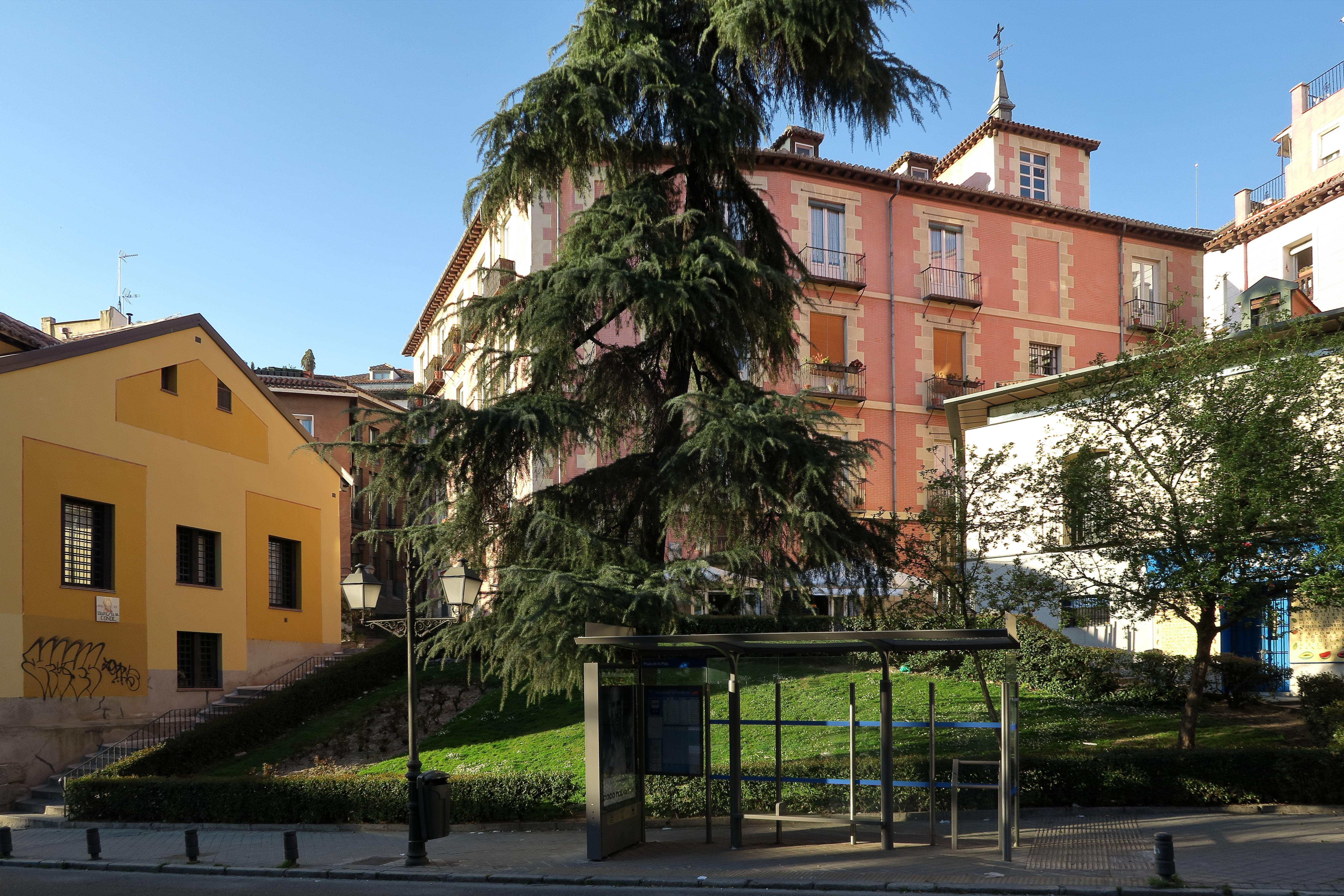 Travesía del Conde, desde la calle de Segovia